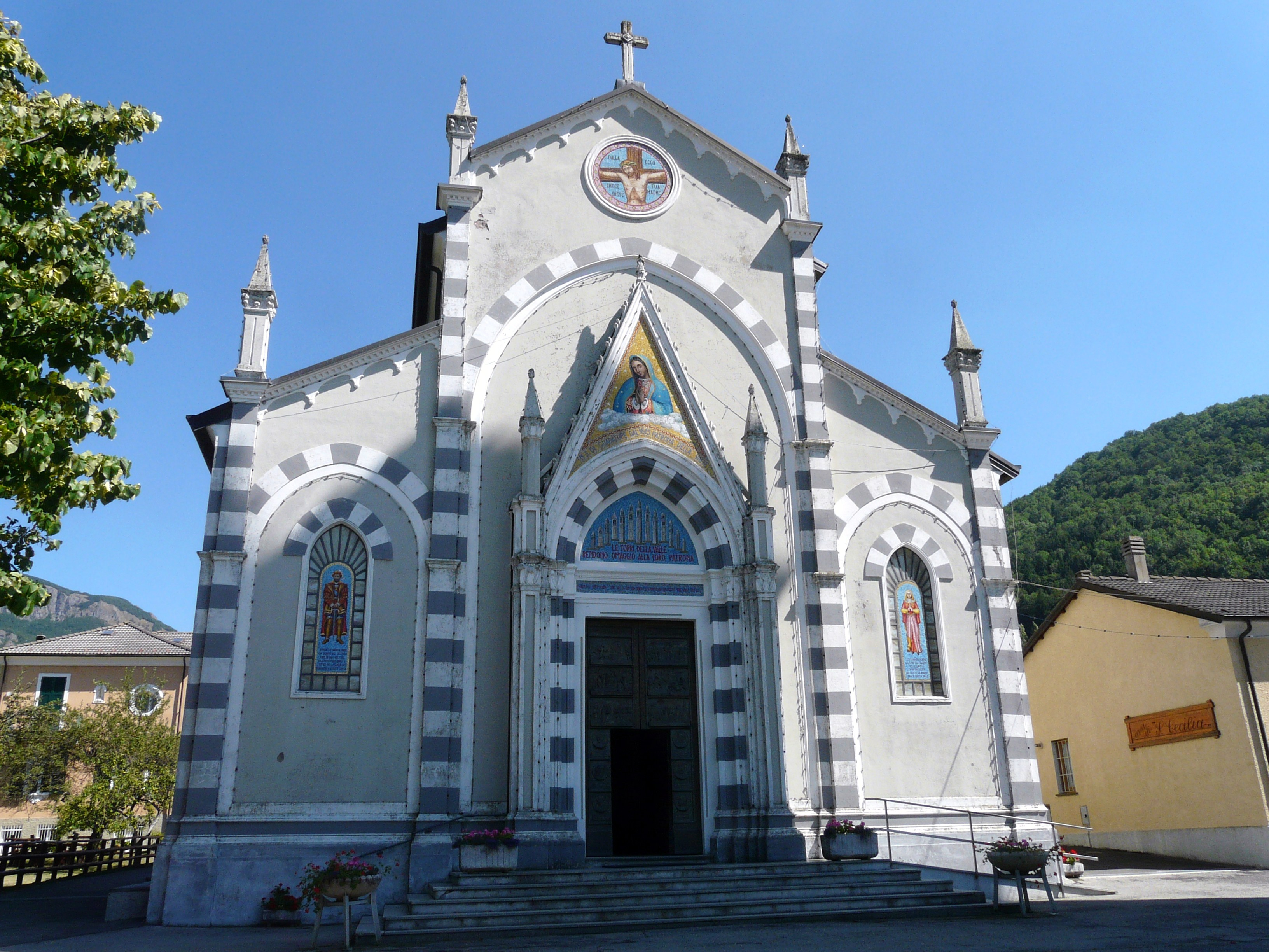 Serie di immagini del santuario della Madonna di Guadaupe, Santo Stefano d'Aveto, Liguria, Italia